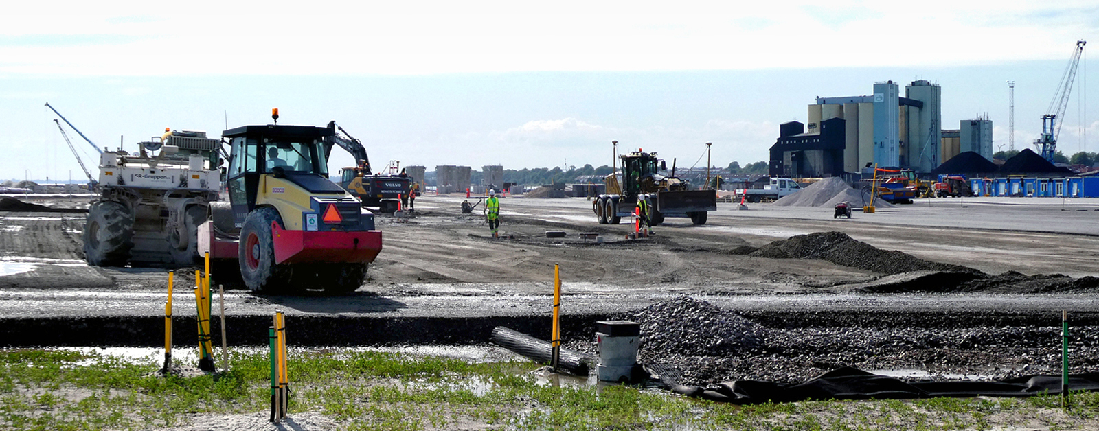 Ett bygge är en vanlig arbetsplats för många. På bilden byggs det på en del av Ystads nya hamn 29 juni 2020.